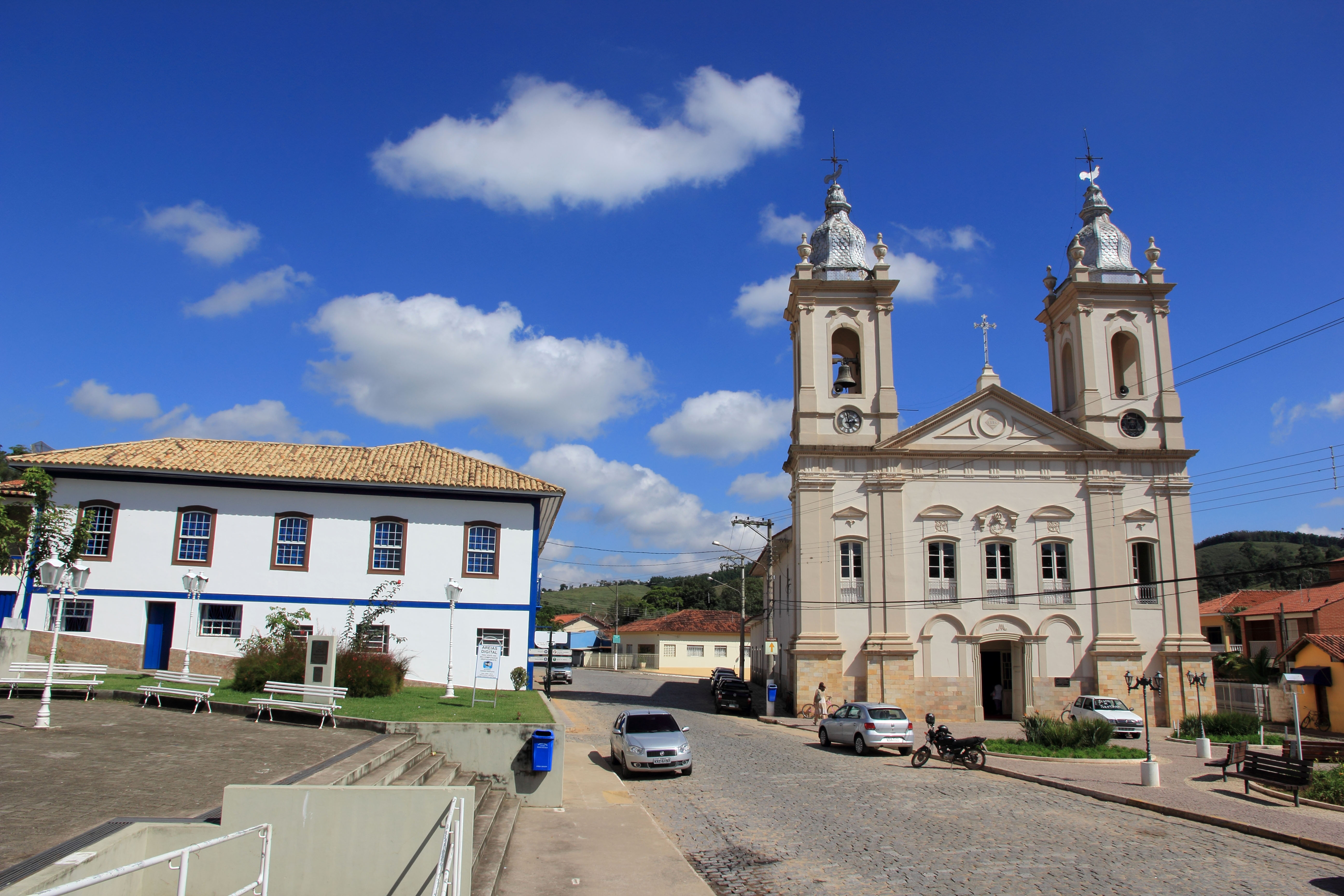 Casarão antigo e Igreja Matriz Sant'Ana em Areias, SP.